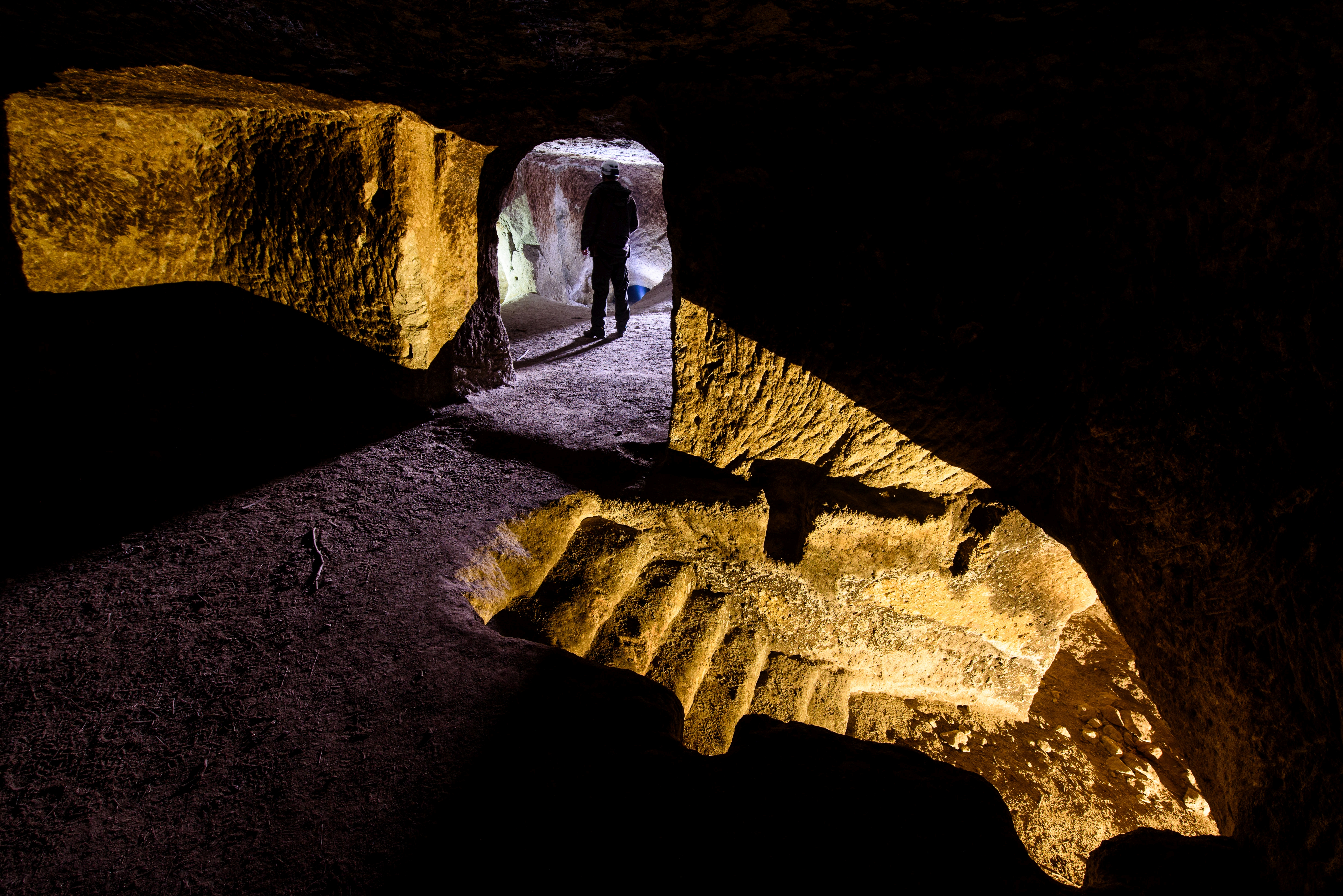 Százrejtekű Andornaktálya határában